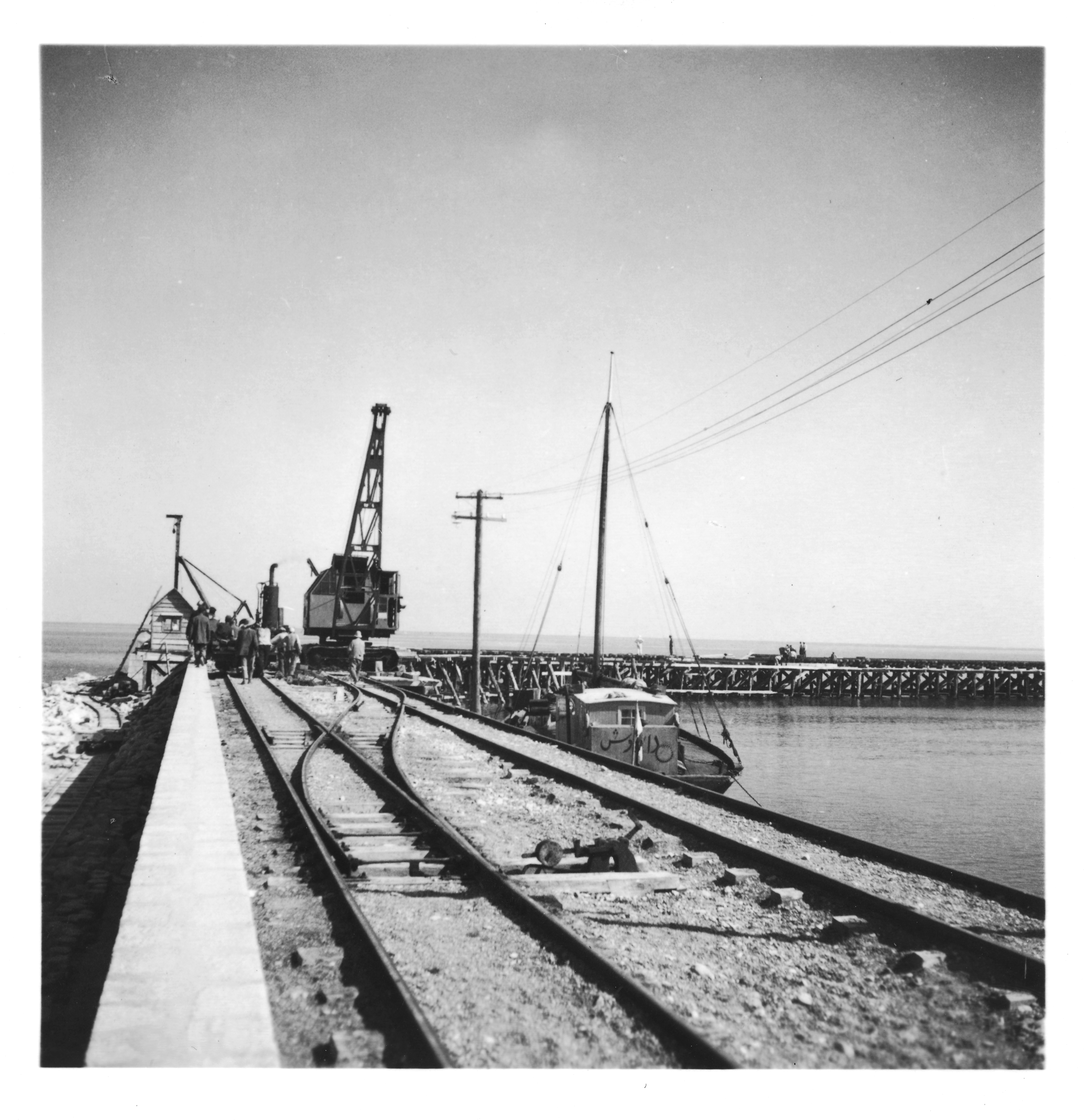 Persien, Deno (in der Nähe von Chalus, Chaloos, Chalous): Hafen (Lokalisierung unsicher); Hafenbecken mit einem Kran und einem Boot